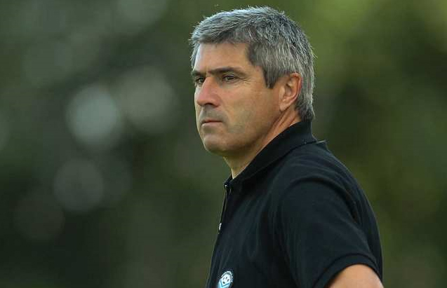 Daniel SANCHEZ, entraineur du Tours Football Club